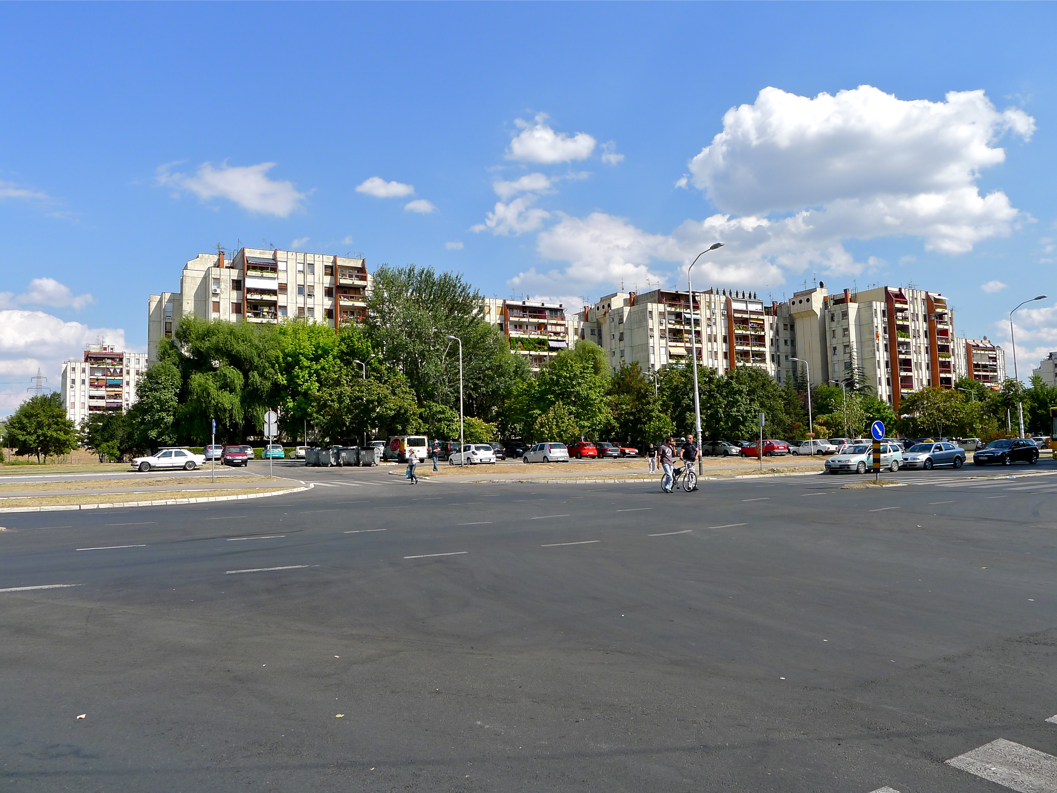 Блок 70а раскрсница